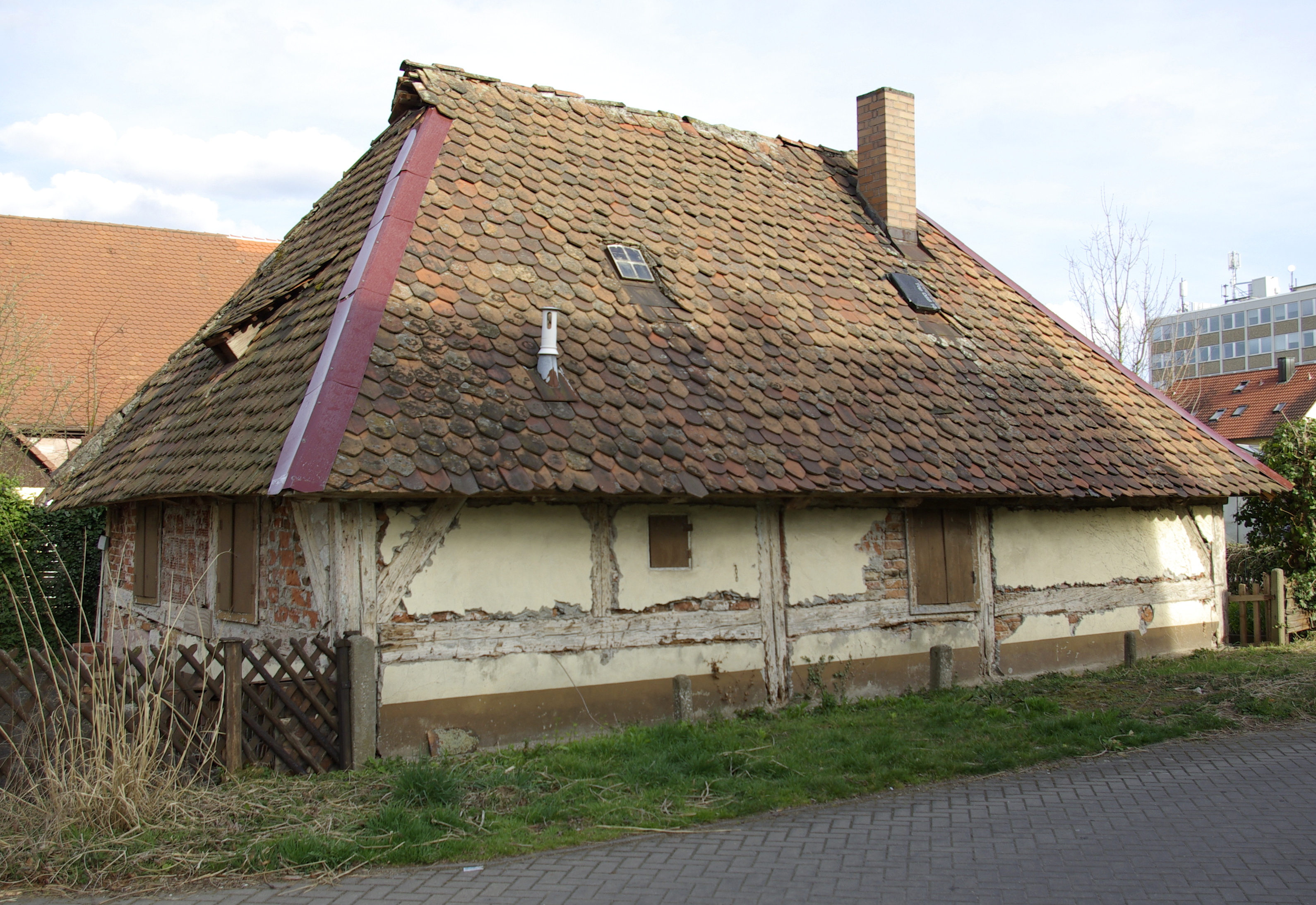 Das Schwedenhaus (Franken) in der Großreuther Straße 98 im Nürnberger Stadtteil Großreuth hinter der Veste.